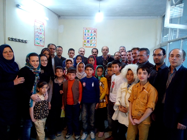 ფერეიდუნშაჰრის ენების ინსტიტუტის ქართული კლასის ქართველი მოსწავლეები